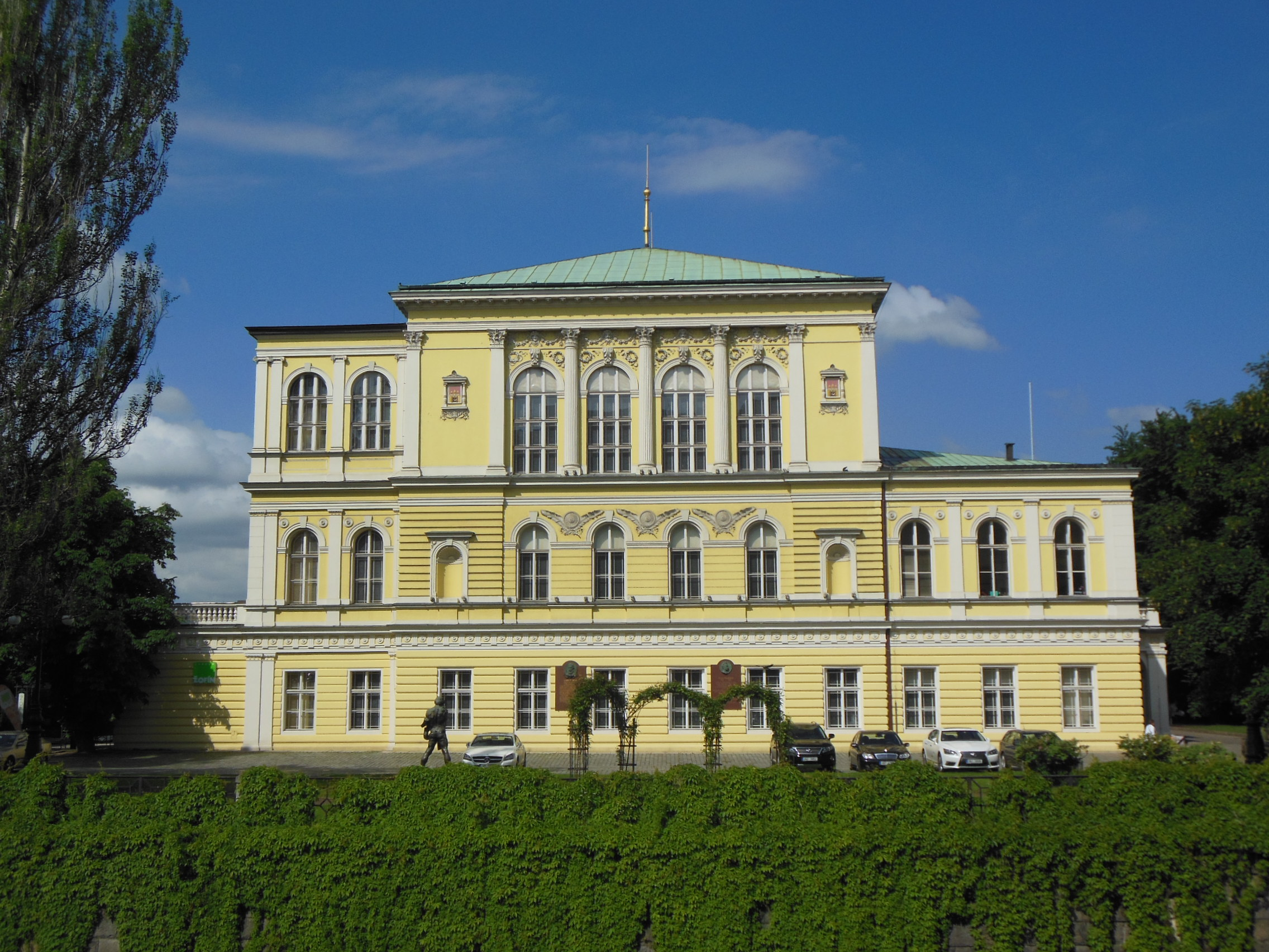 Palác Žofín na Slovanském ostrově v Praze na Novém Městě.